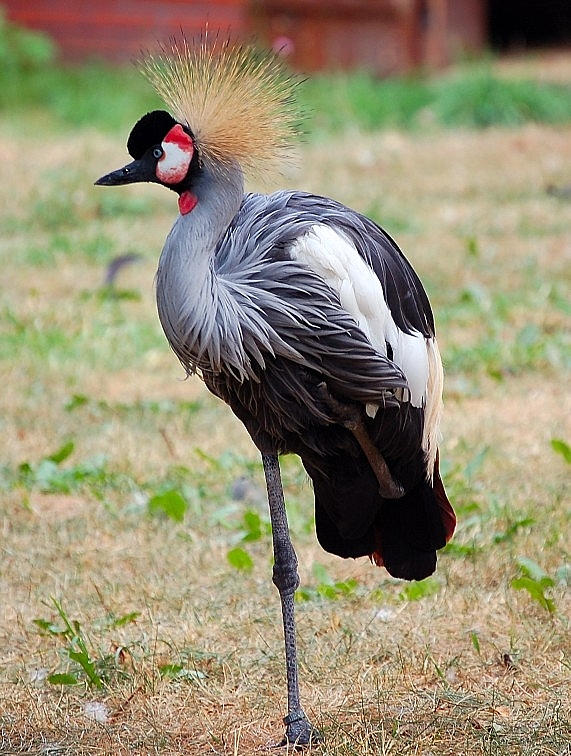 Balearica regulorum